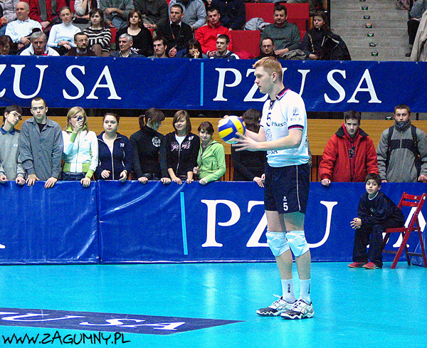 Paweł Zagumny, 2005-2006